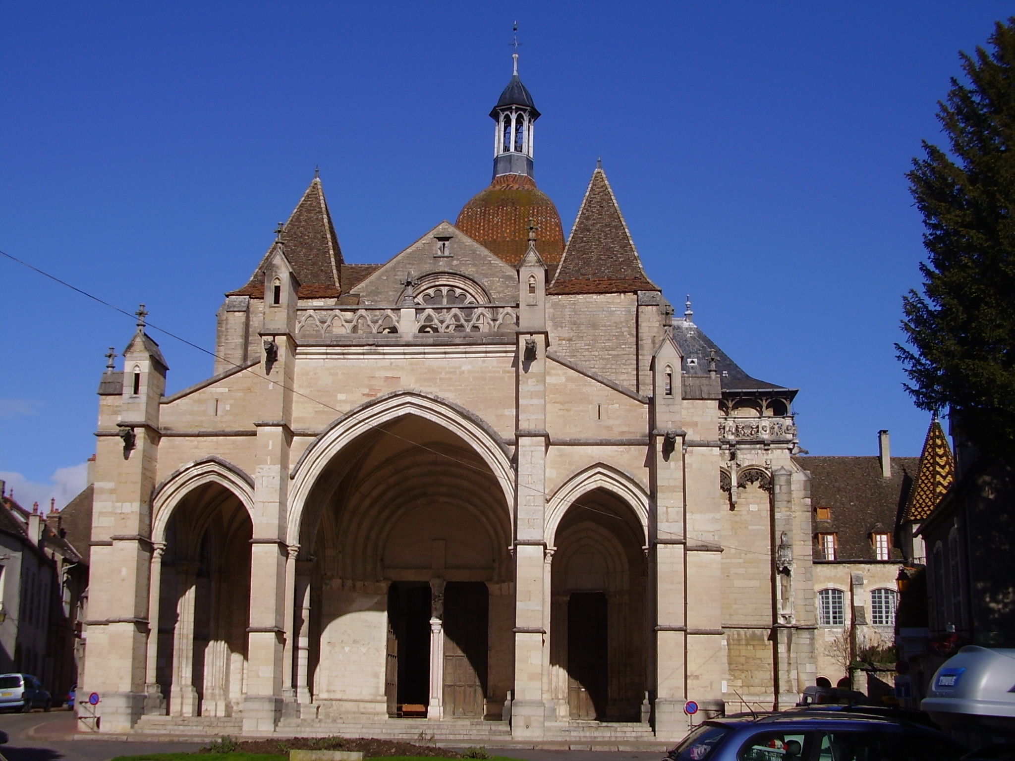 Collégiale Notre-Dame de Beaune (France)